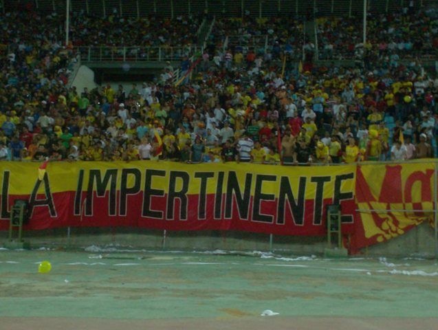 LA IMPERTINENTE